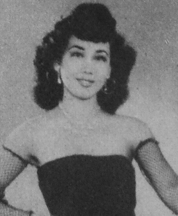 淡路恵子（SKD時代）